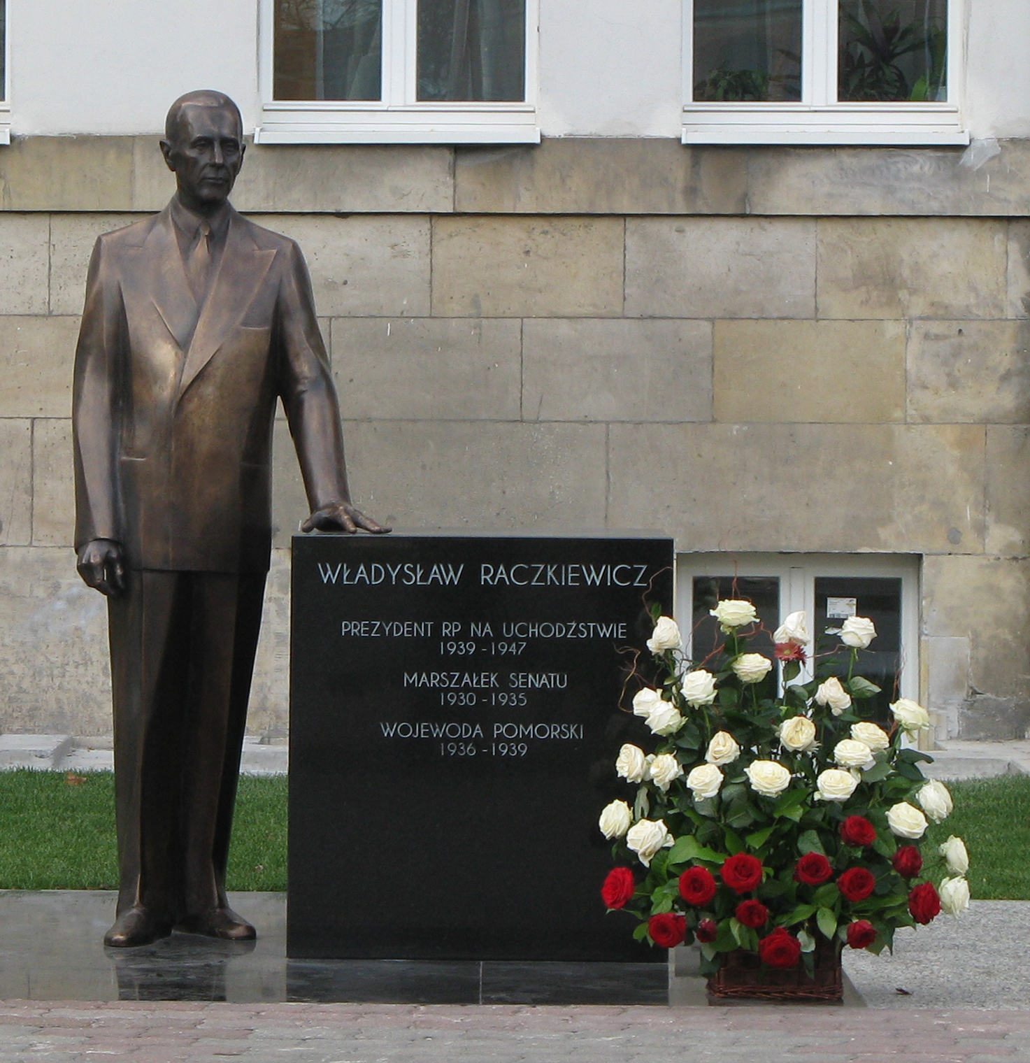 Pomnik Władysława Raczkiewicza autorstwa Zbigniewa Mikielewicza odsłonięty 25 października 2010 w Toruniu